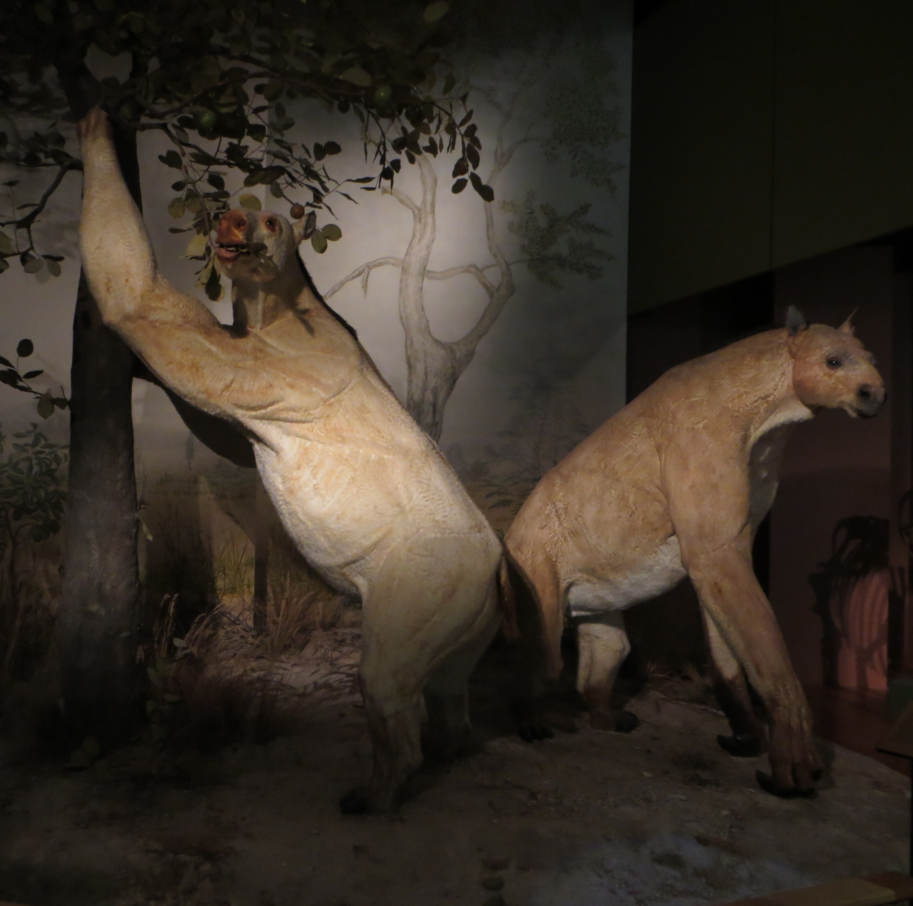 Models of chalicotheres - Took the picture at Natural History Museum, Basel